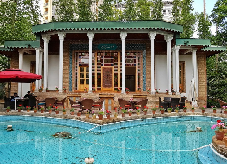 Iranian art Museum Main Building